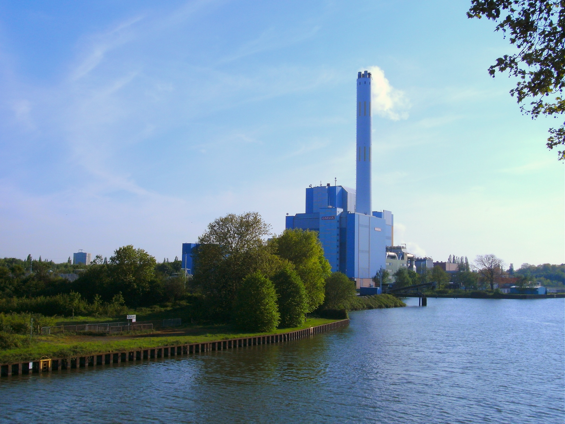 Müllverbrennungsanlage Oberhausen (am Rhein-Herne-Kanal)